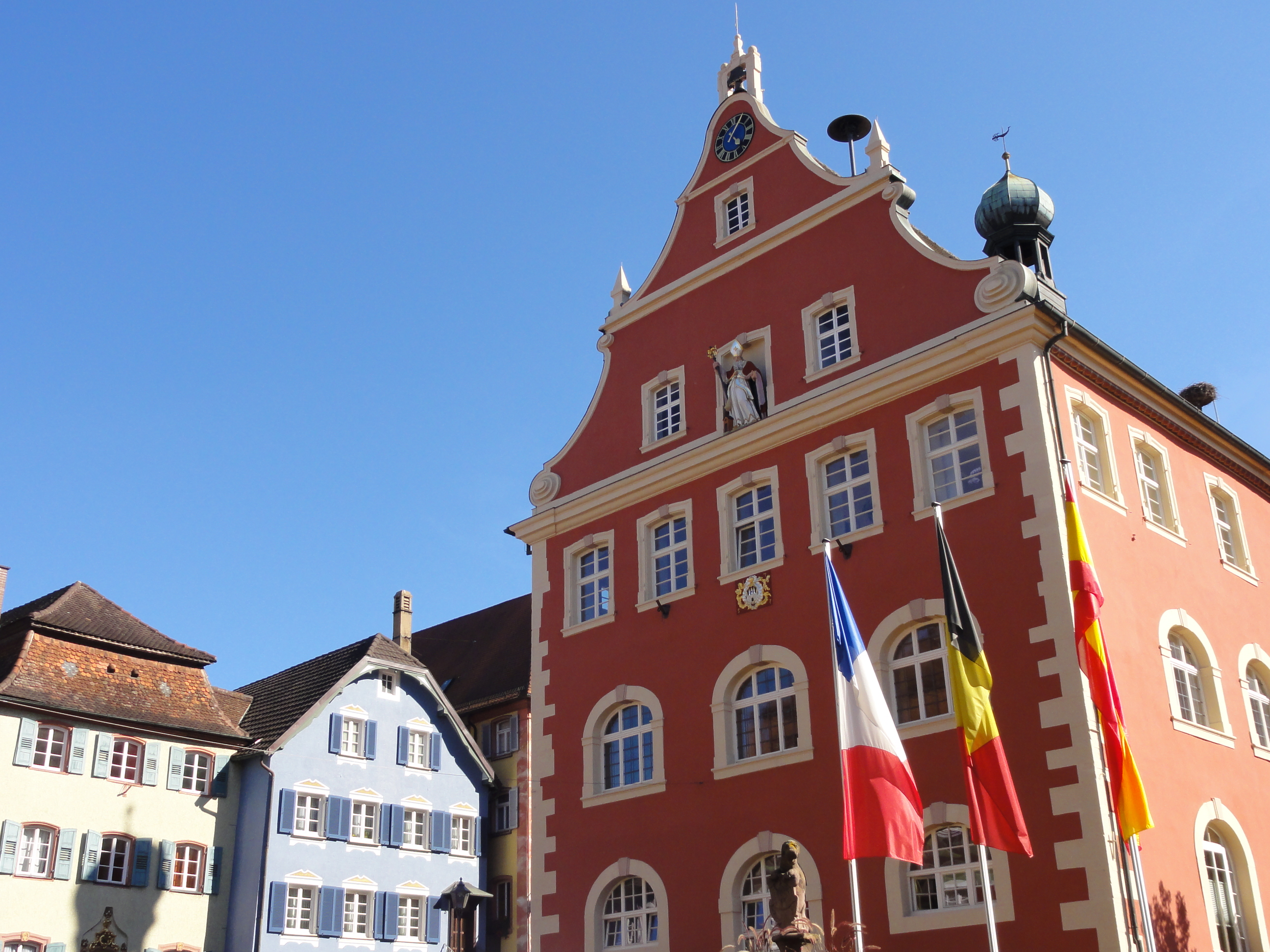 Baden-Württemberg, Ettenheim, Rathaus